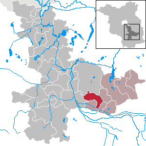 Neu Zauche in Brandenburg (Country) - District Dahme-Spreewald